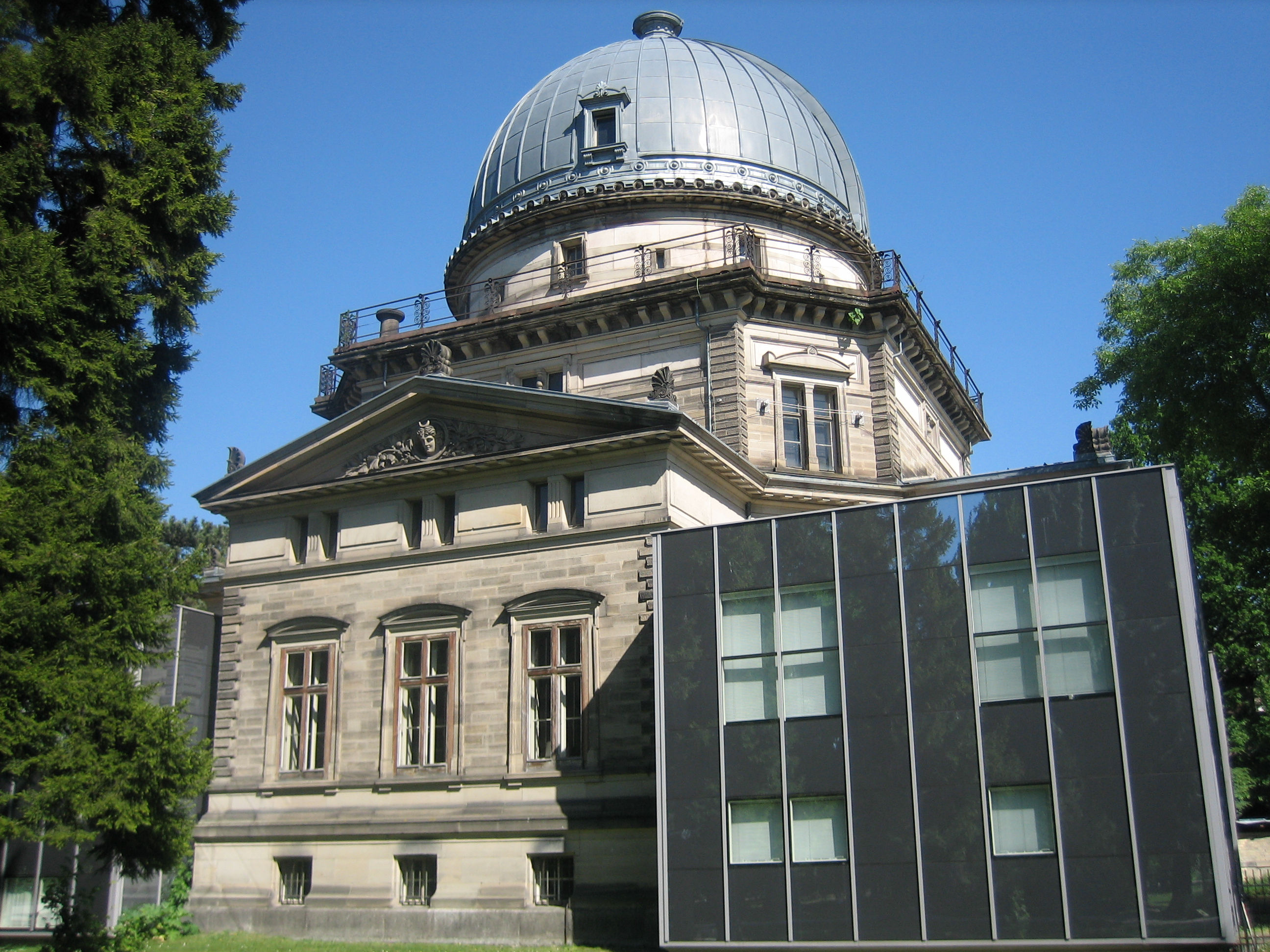 Observatoire de Strasbourg